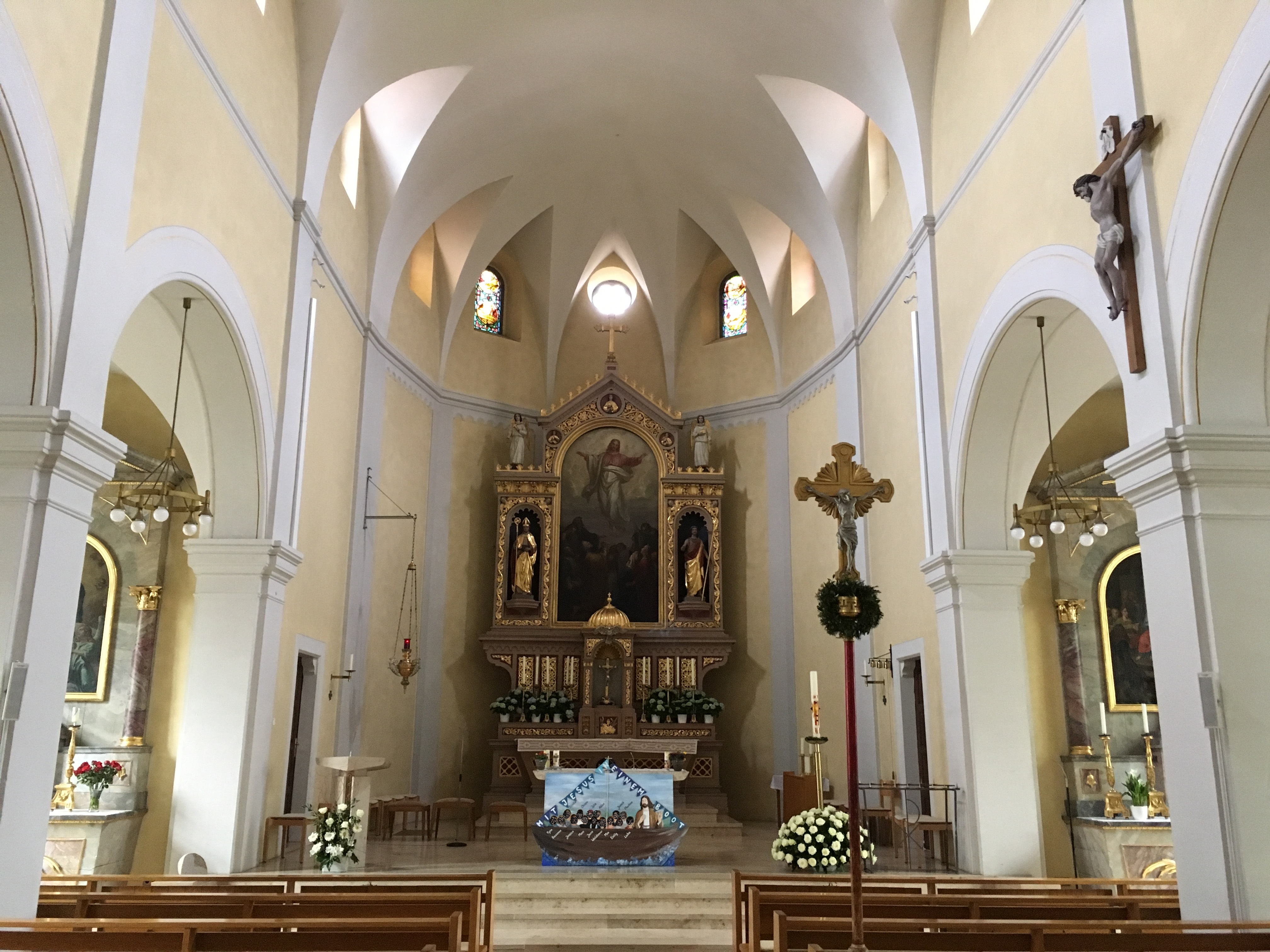 St. Laurentius ist die Pfarrkirche der Gemeinde Hügelsheim im Landkreis Raststatt in Baden-Württemberg. Die neuromanische, dreischiffige Basilika entstand in den Jahren 1842 bis 1843.